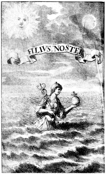 Abb. in Besondere Chymische Schriften, Hamburg 1705